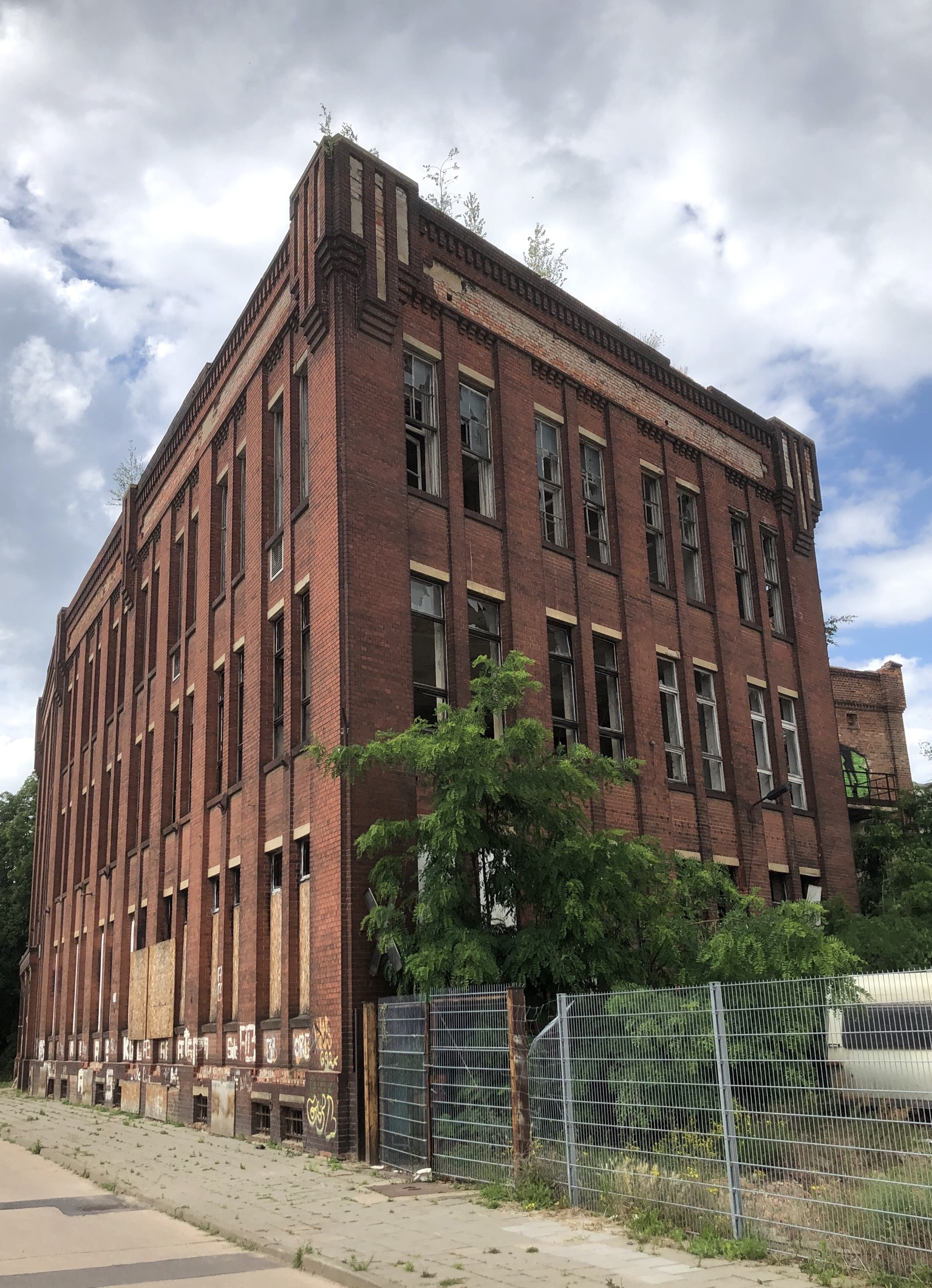 PROWIKO Paulstraße in Schönebeck